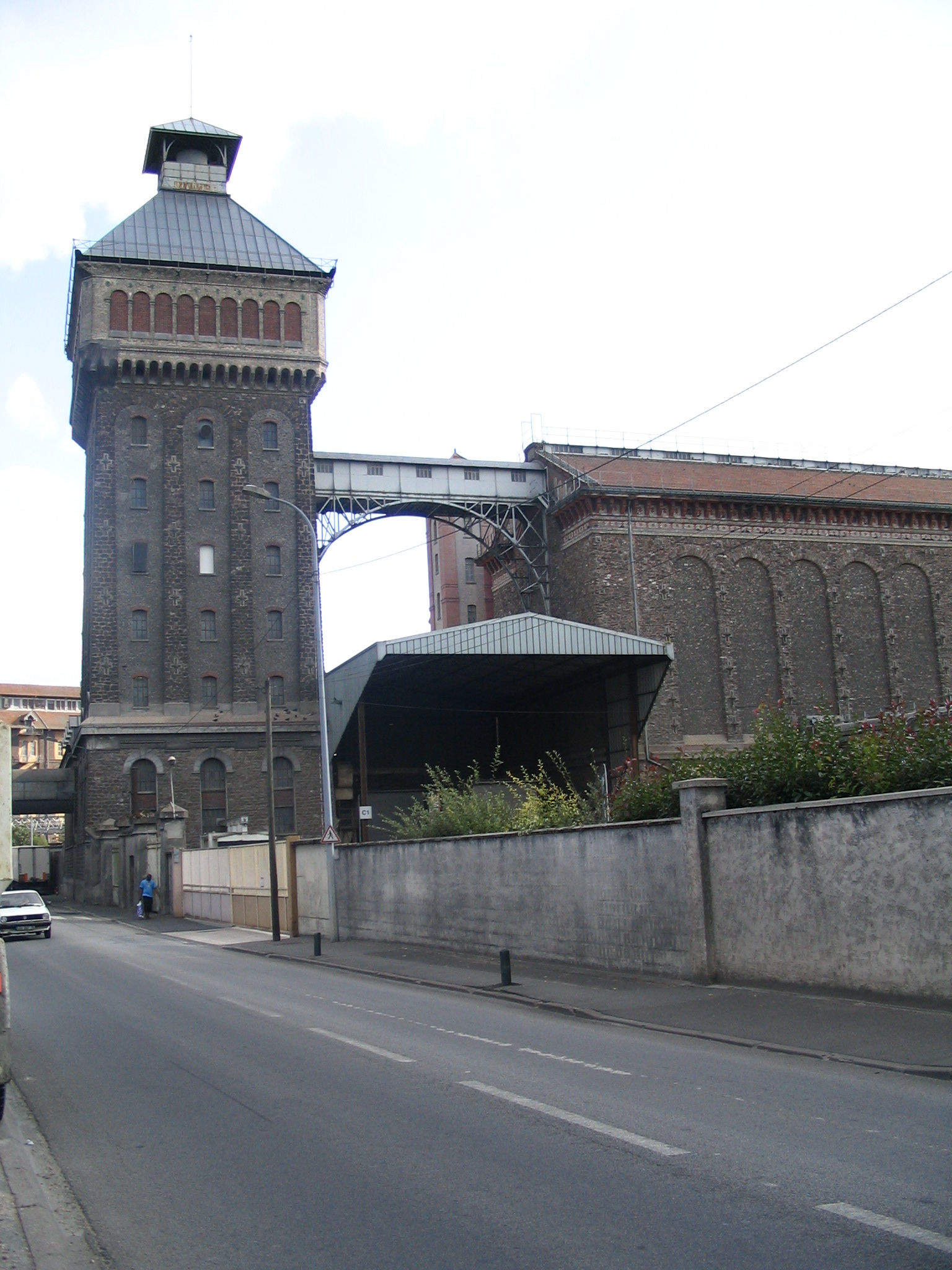 Grands moulins de Corbeil - Architecte Paul Friesé - Corbeil-Essonnes, France